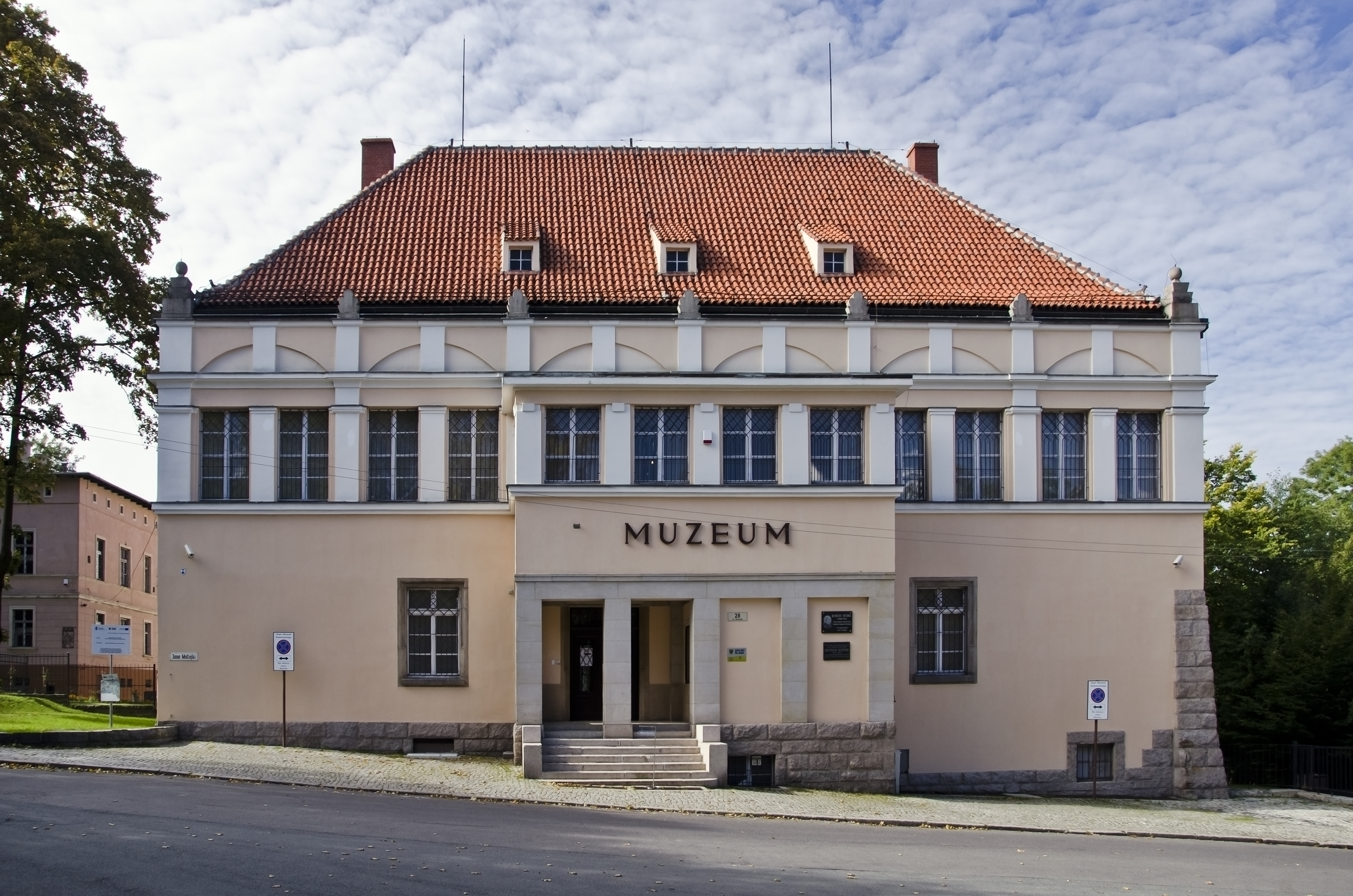 Jelenia Góra, ul. Jana Matejki 28 - Muzeum Towarzystwa Karkonoskiego (zabytek nr 1292/J z 11.04.1997)